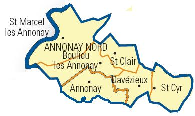 Carte détaillée des communes du canton (Ardèche)